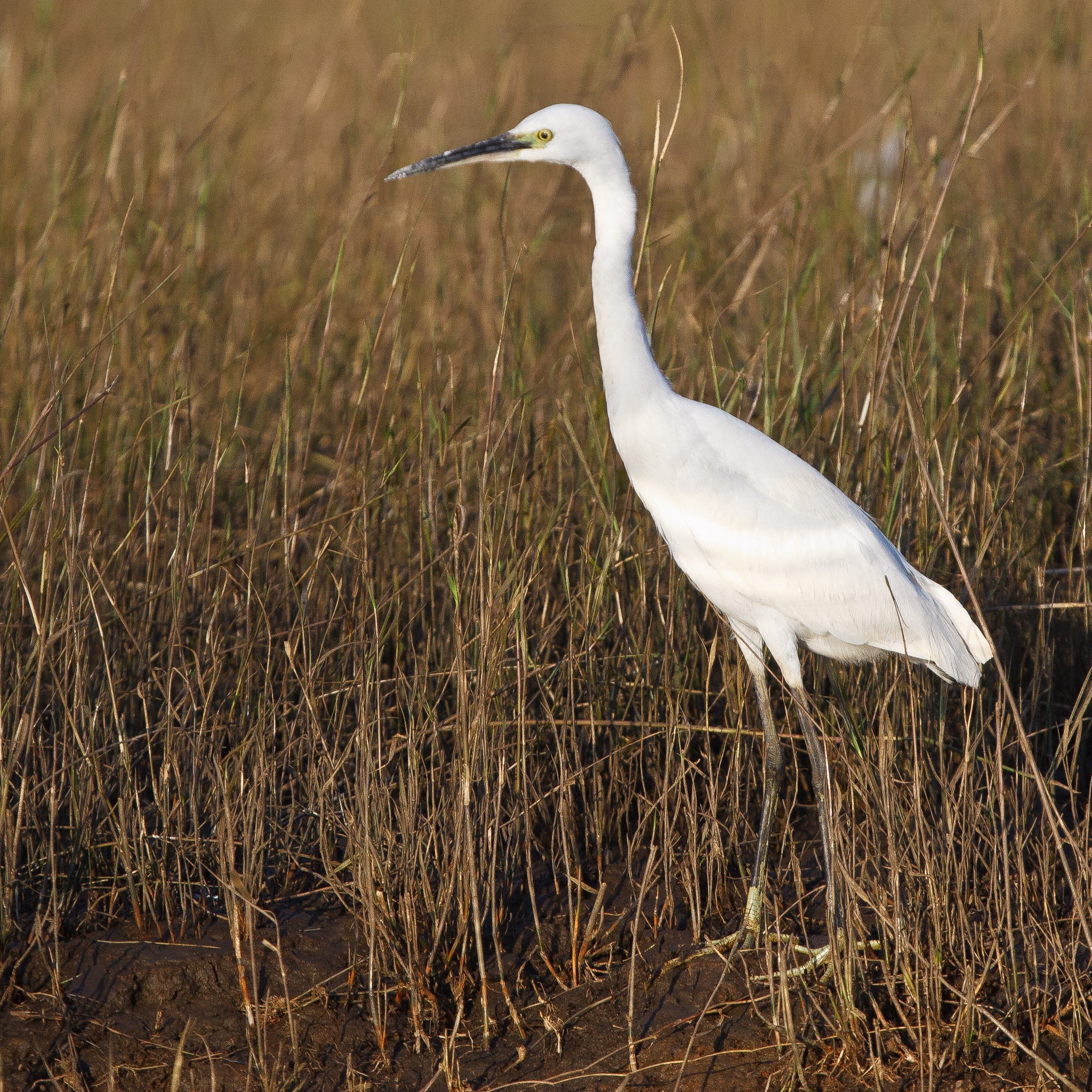 Little Egret